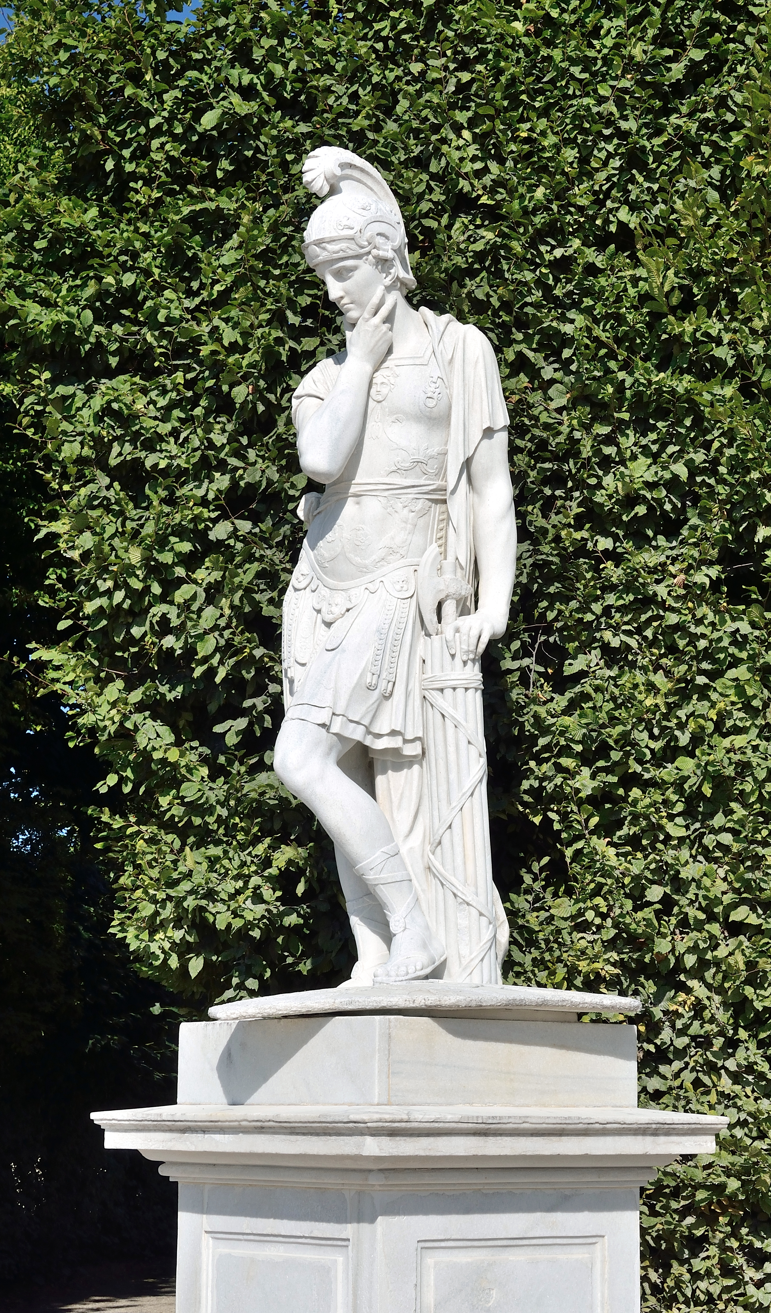 Wien, Schlosspark Schönbrunn, Figuren aus Sterzinger Marmor am Großen Parterre, 1773–1780; Nr. 26: Fabius Cunctator (Quintus Fabius Maximus Verrucosus). Bildhauer: Joseph Baptist Hagenauer